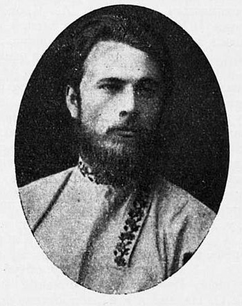 Егор Егорович Лазарев (1855—1937) — народник, эсер, делегат Всероссийского Учредительного собрания, министр просвещения в КОМУЧе, политэмигрант, редактор. Из собрания музея "Ссылка и каторга"